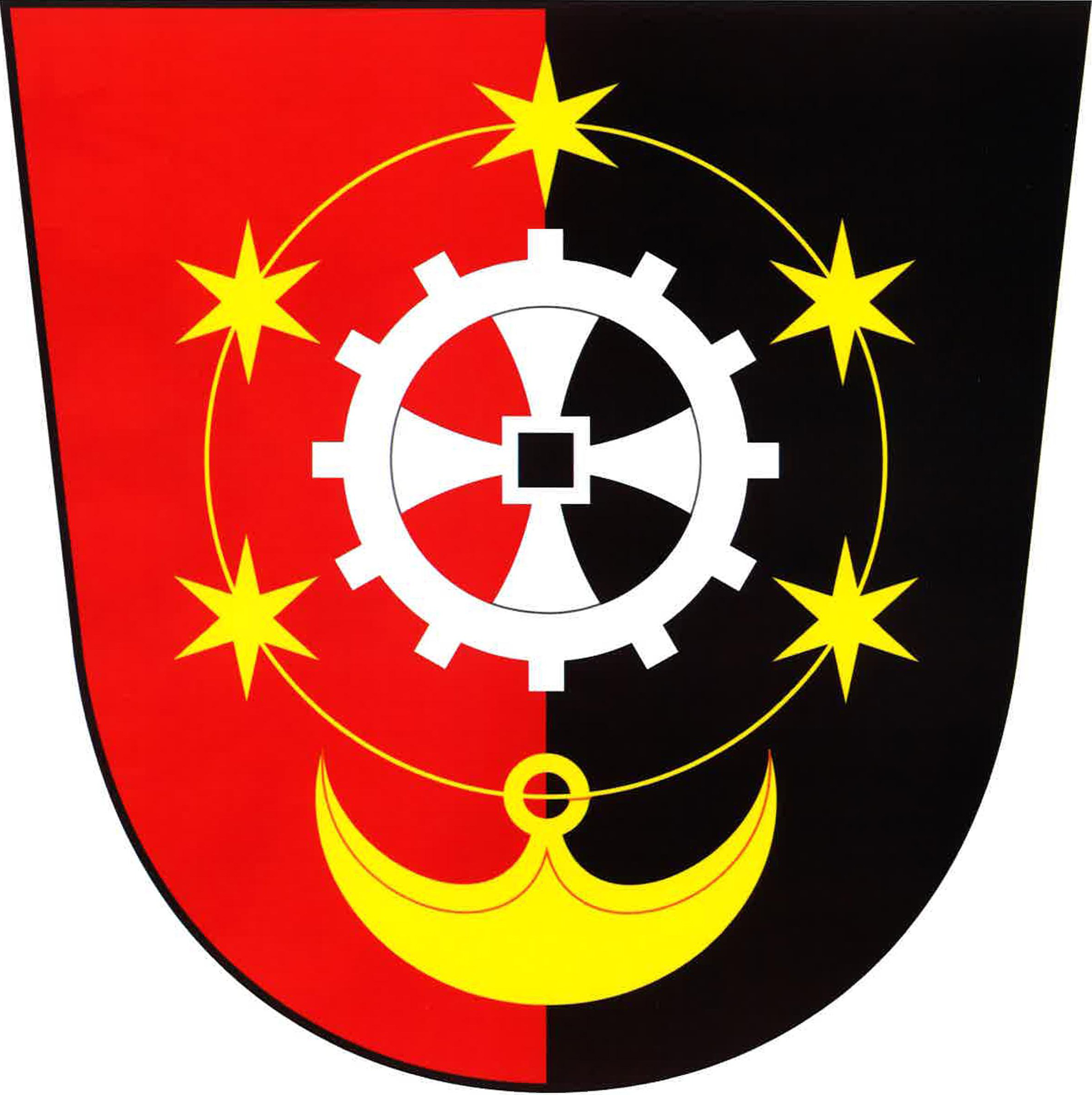 Trhanov znak